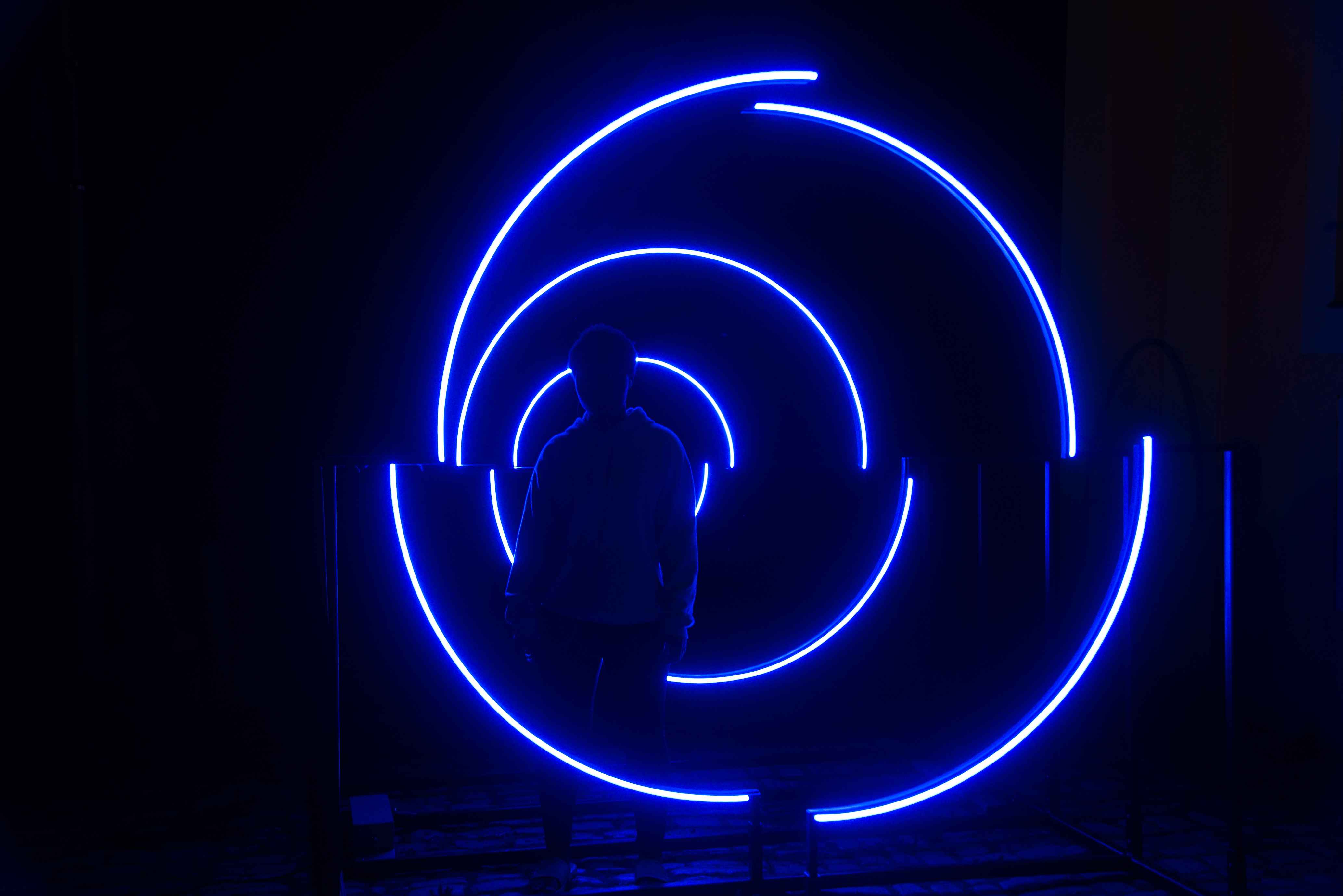 Wegeinstallation "YPOV" von Studio De Shutter und Dölken Lighting, 2018. Foto: Henry Sowinski